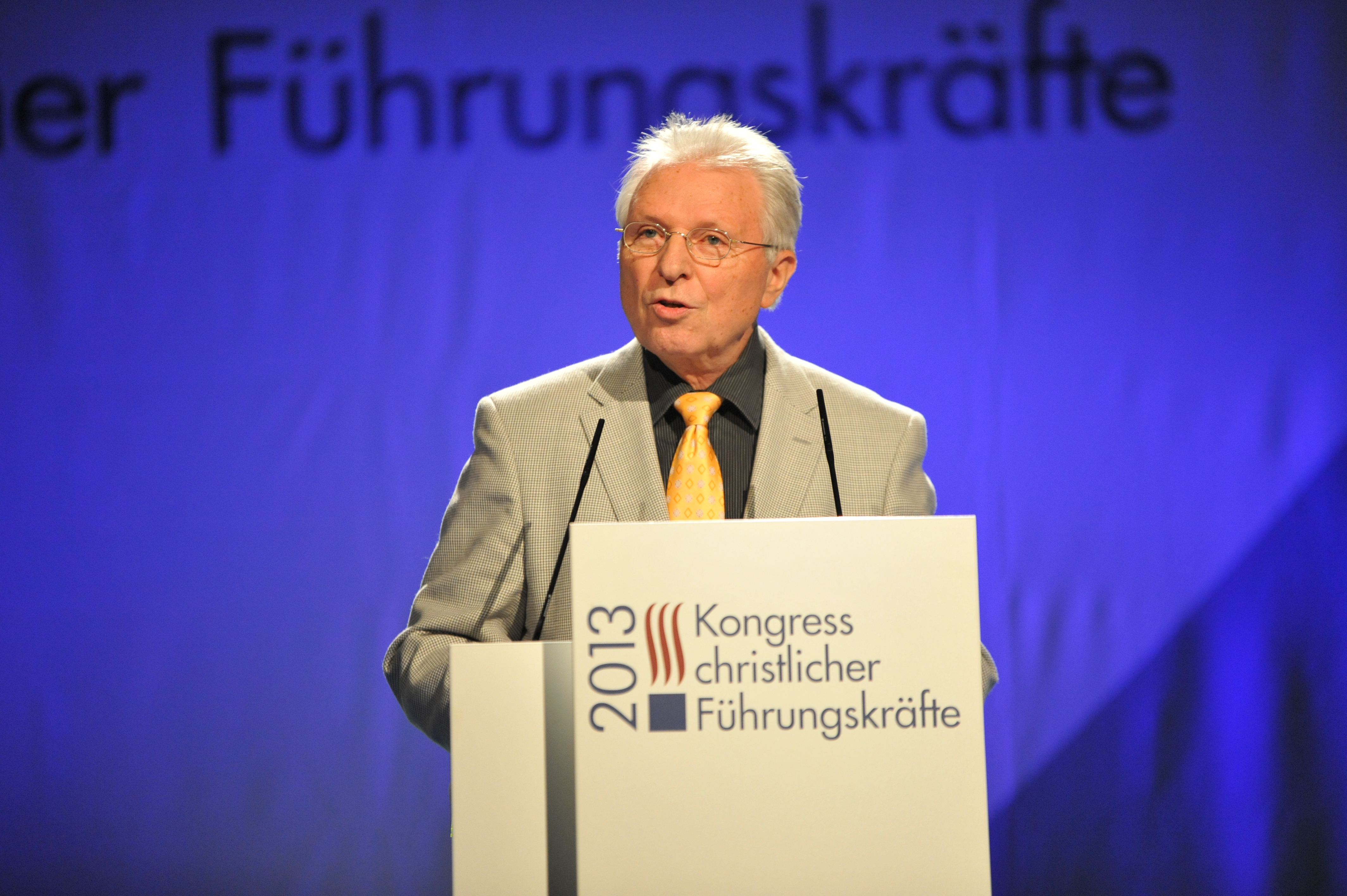 Unternehmer Joachim Loh am 17. Januar 2013 auf dem Kongress christlicher Führungskräfte in Leipzig.